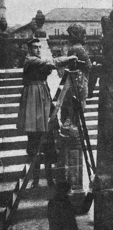 Luis Casado, fotografía en Vida Gallega 1920